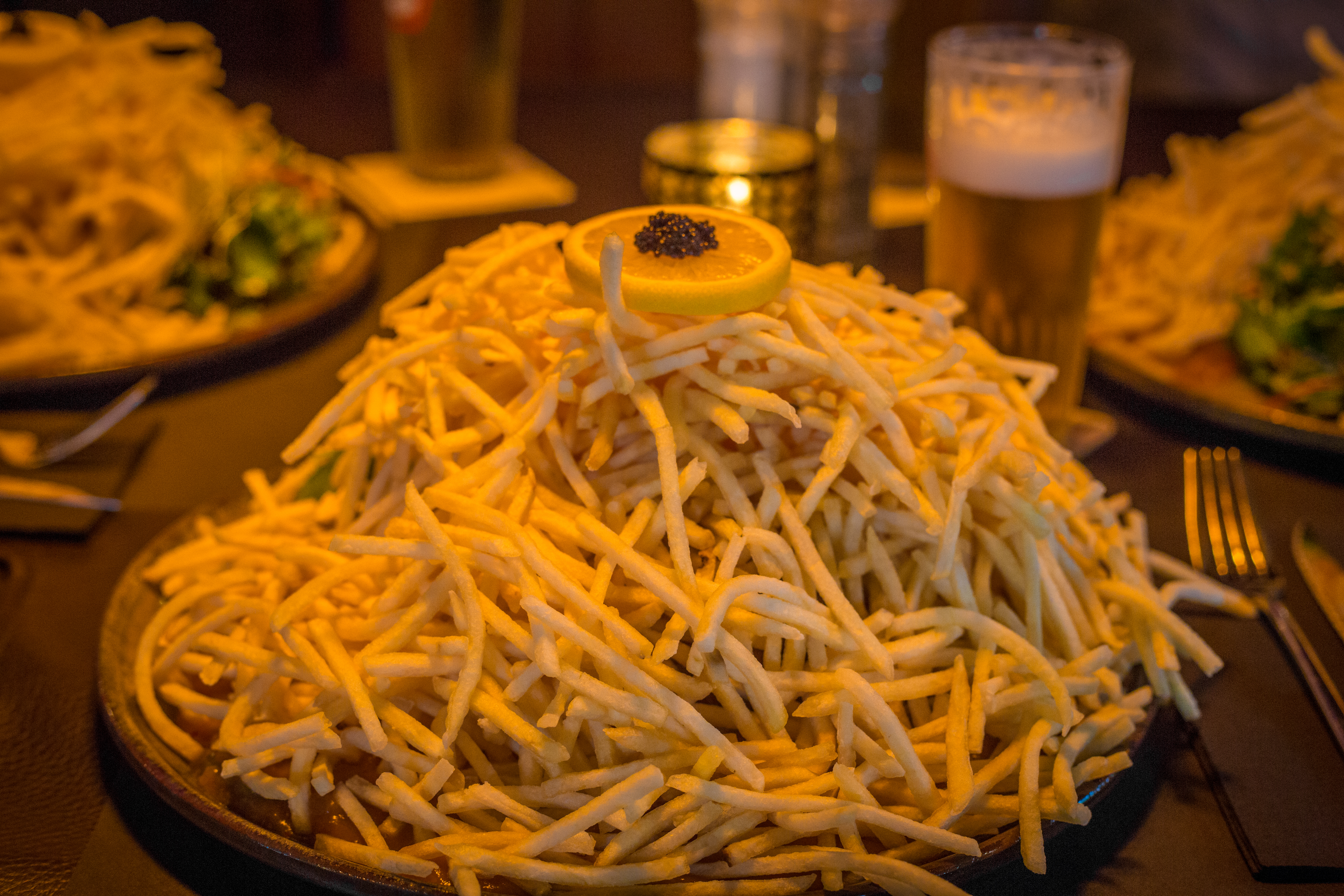 Een schotel steppegras in restaurant De Prestige in Leopoldsburg, 2017